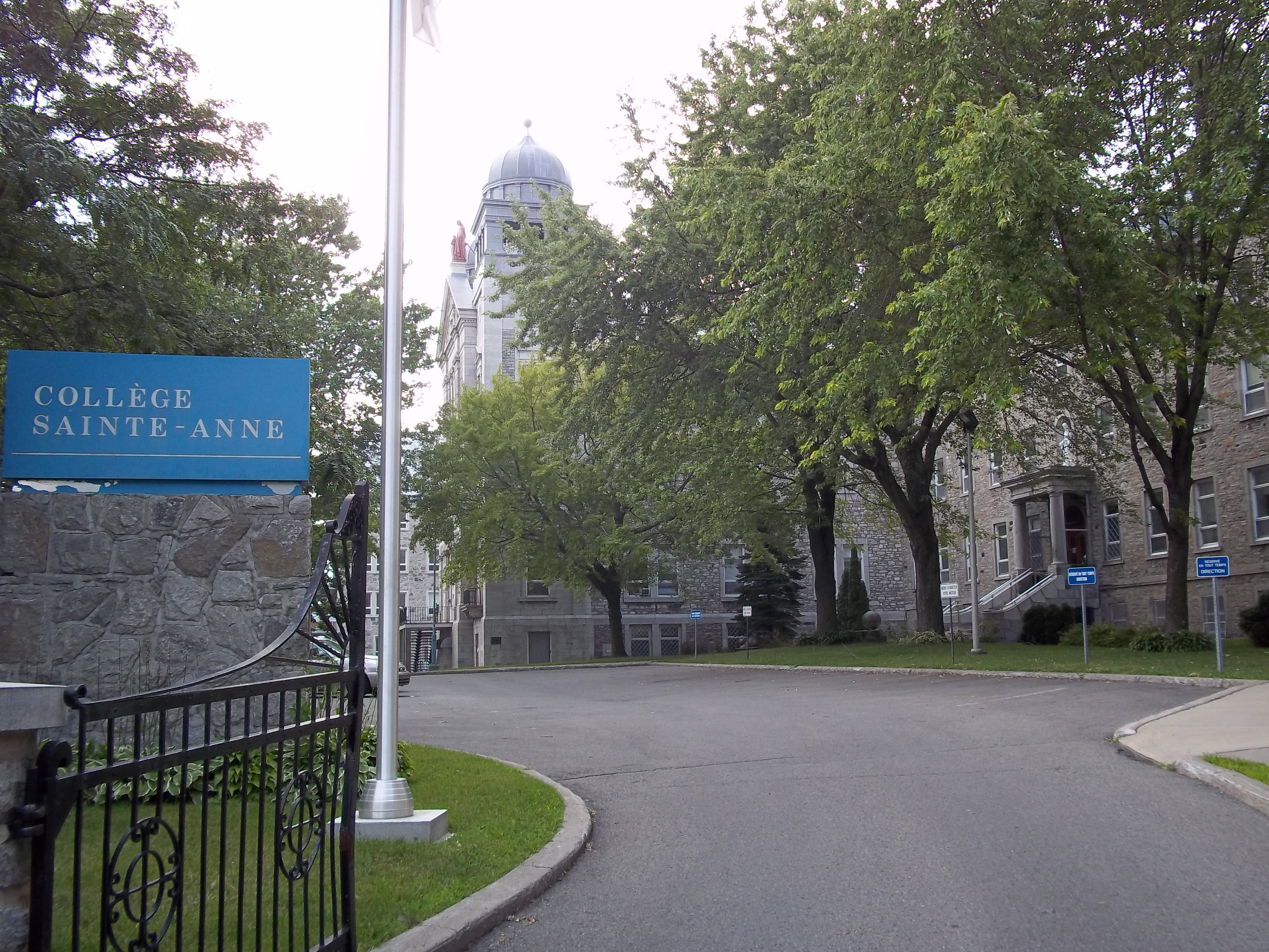 Collège Sainte-Anne, 1200, rue Saint-Joseph, Lachine